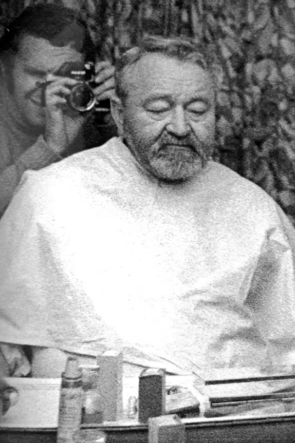 Autoportrét Ivana Soeldnera s hercem Janem Werichem v šatně filmových studií na Barrandově